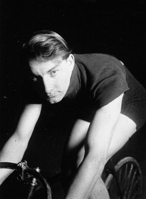 Les 24 Heures du Vel d'Hiv, Spears